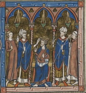 Couronnement d'Amaury Ier